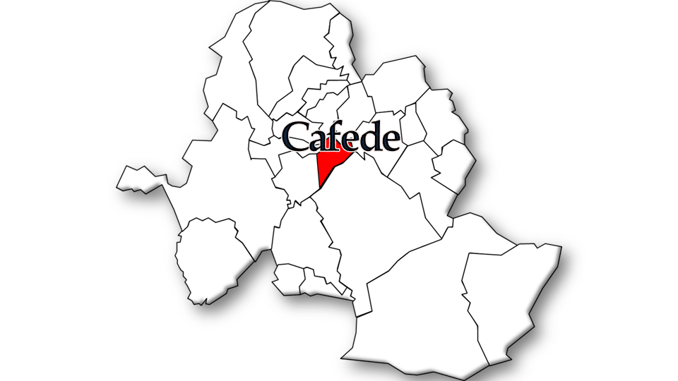 População